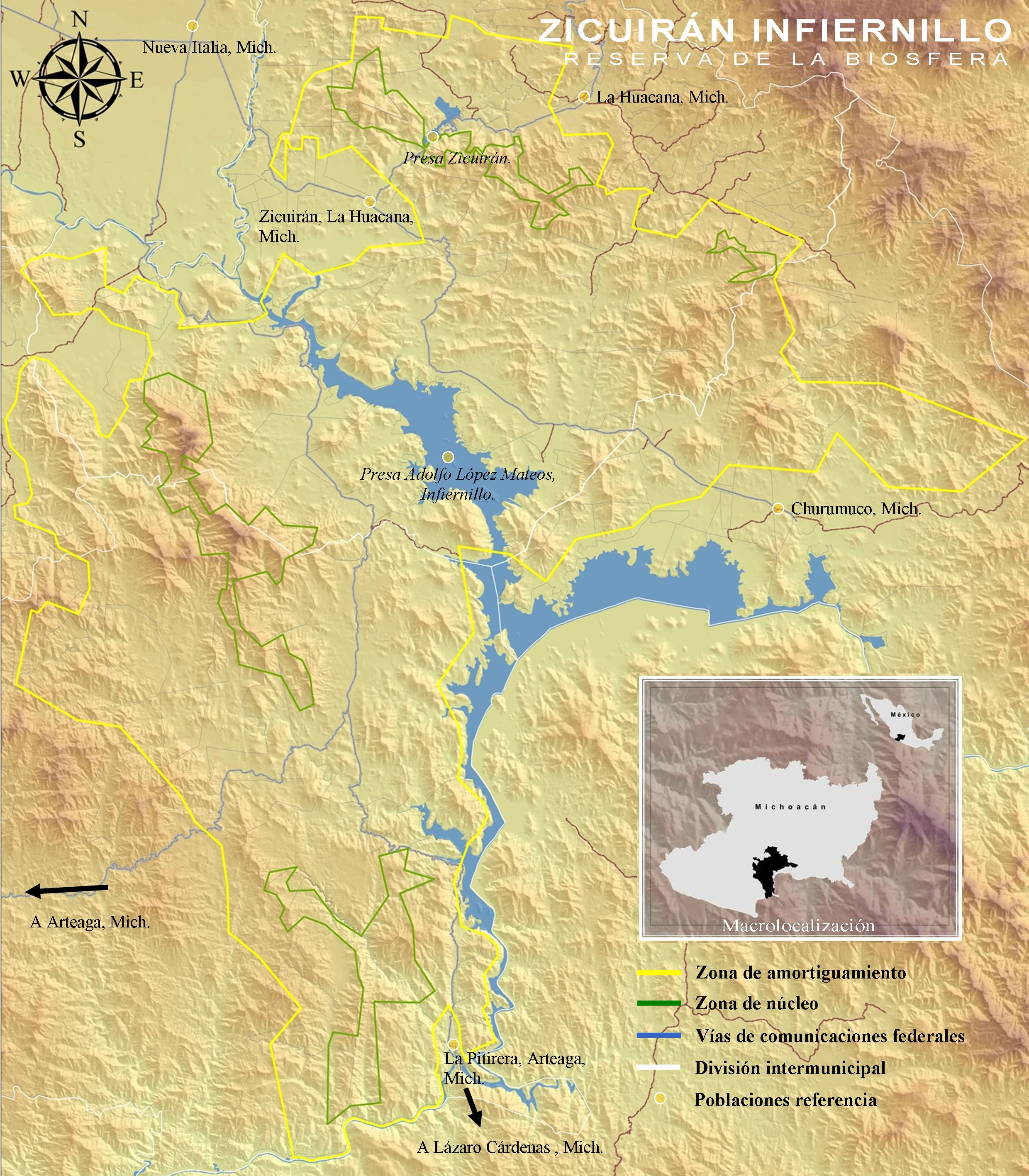 Croquis general de la RBZI, incluye poblaciones de referencia, zona de amortiguamiento, zona núcleo así como macrolocalización.